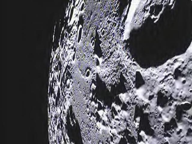 Foto de la superficie lunar tomada por la sonda Ebb